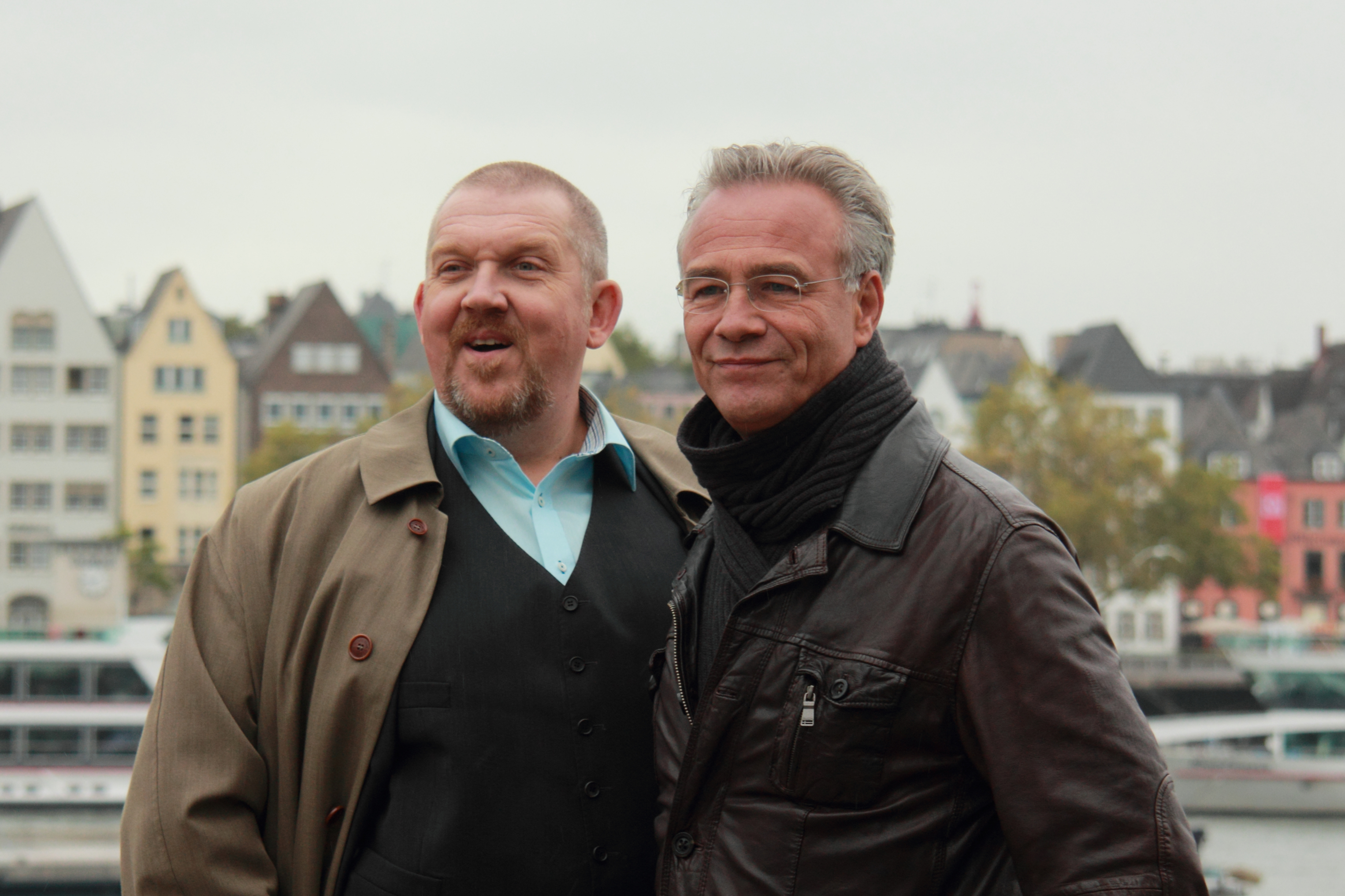 Dietmar Bär und Klaus J. Behrendt als Ballauf und Schenk bei einem WDR-Pressefototermin zum Kölner Tatort "Ihr Kinderlein kommet"